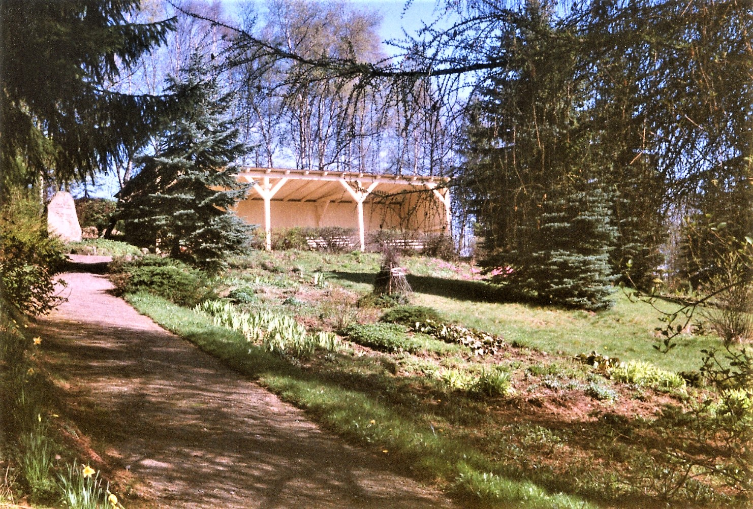 Blick zur ehemaligen Liegehalle